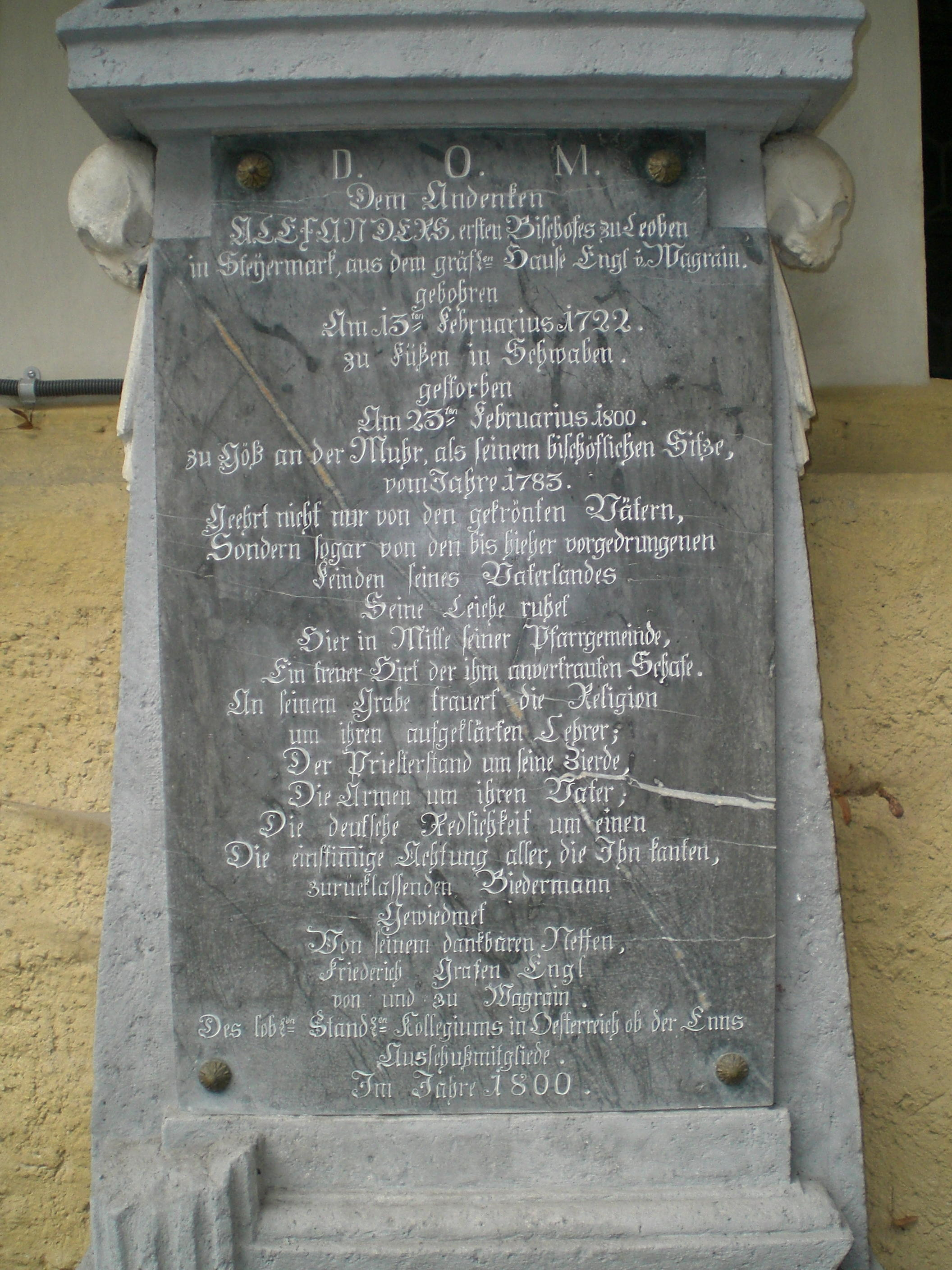 Pfarrkirche Leoben-Göß im ehemaligen Benediktinerinnenkloster Göß, Turmgasse 2,4, Göß, Leoben, Steiermark, Österreich - Grabmal des einzigen Bischofs von Leoben, Alexander Graf Engl von Wagrain (gest. 1800) an der Südfassade der Pfarrkirche